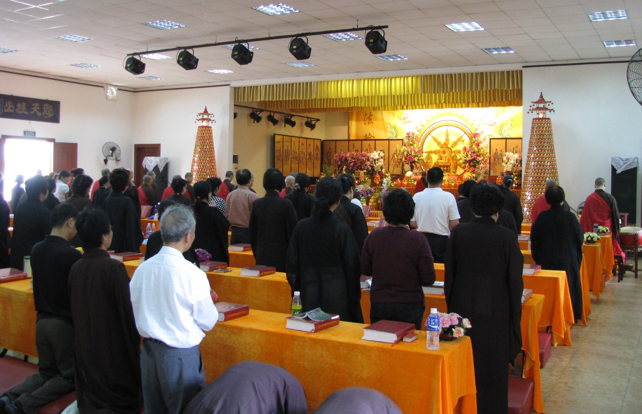 Mooks and Kulapatis in Liurong Si Guangzhou, China.中国广州六榕寺诵经堂内。